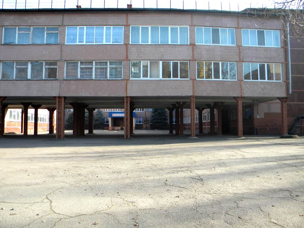 Будівля школи, в якій навчався піонер Василь Нарчук (1927-1943), який загинув на Марухському перевалі Мем. дошка, Дніпро, Ударників вул., 18 (ж/м Сокіл-2, вул. Нєдєліна, 1, СШ №83, Жовтневий р-н)